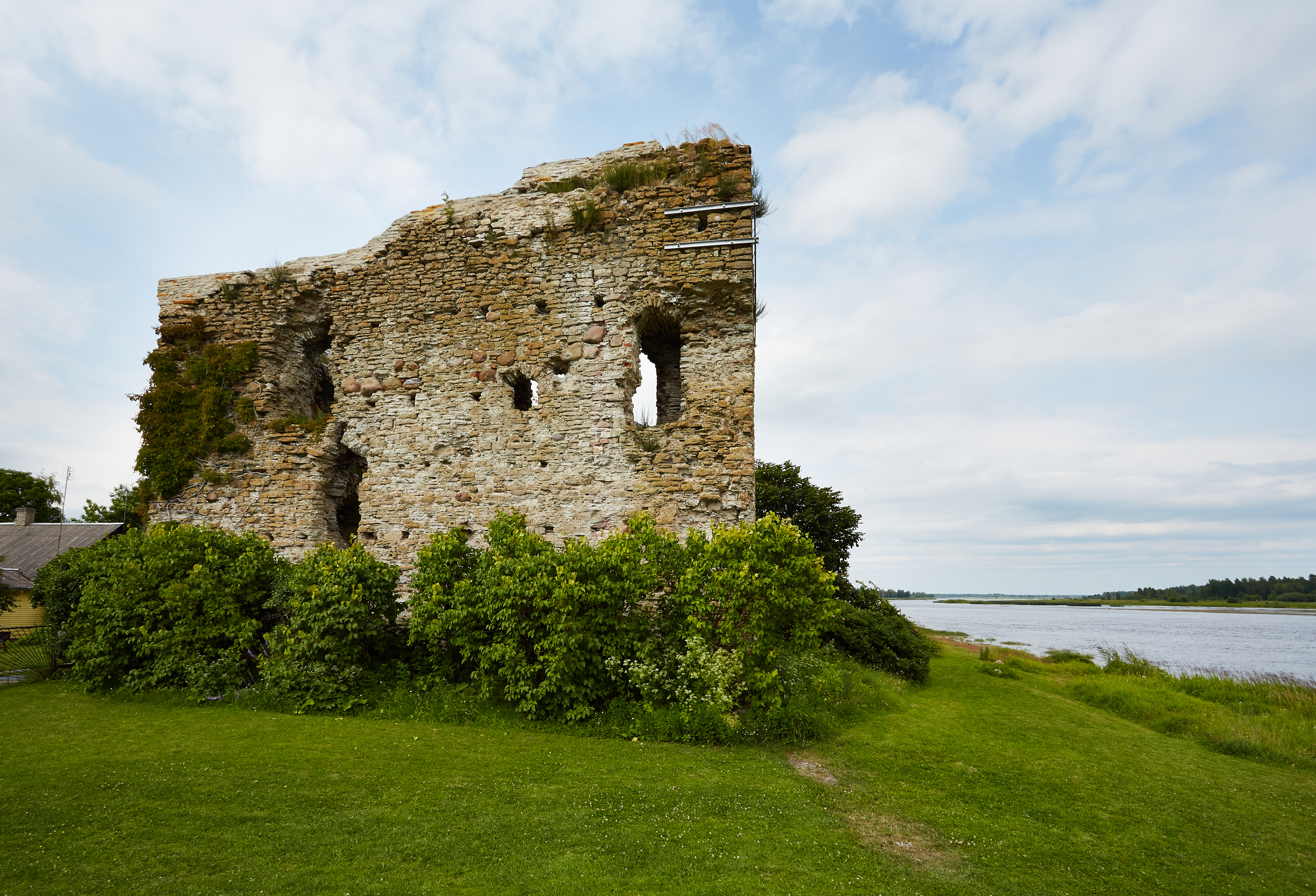 Vasknarva linnuse varemed